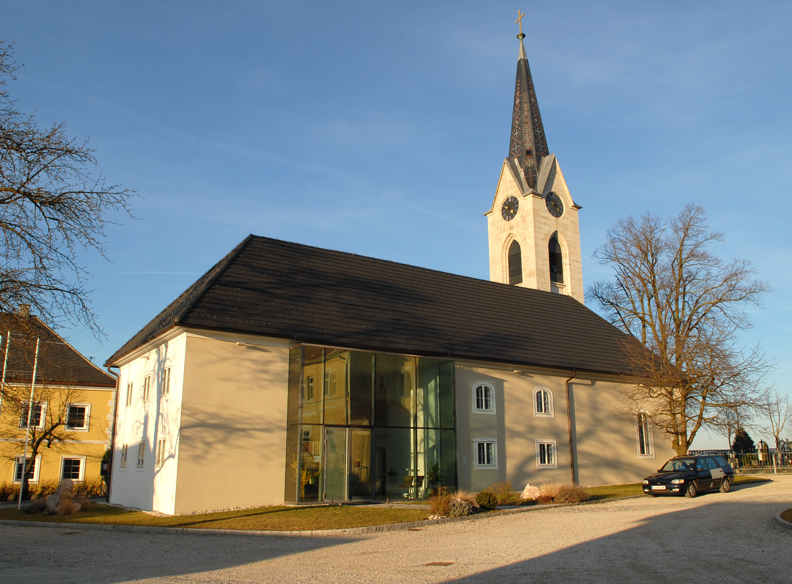 Evangelisches Bethaus in Neukematen in Oberösterreich, errichtet 1783, Turmbau 1878-81, Renovierung 2001-04